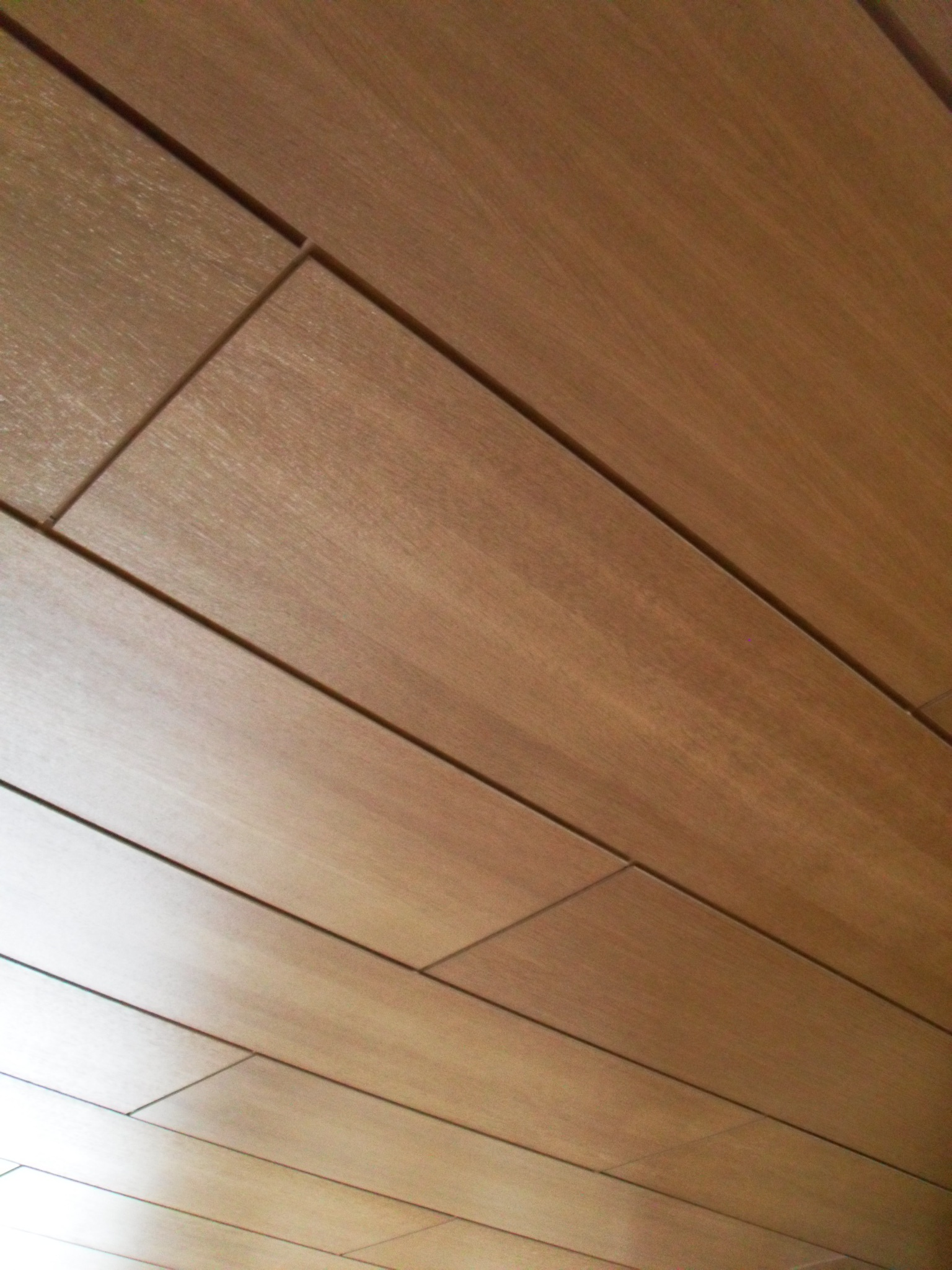 Einfache Deckenpaneele, Echtholz, 29cm breit